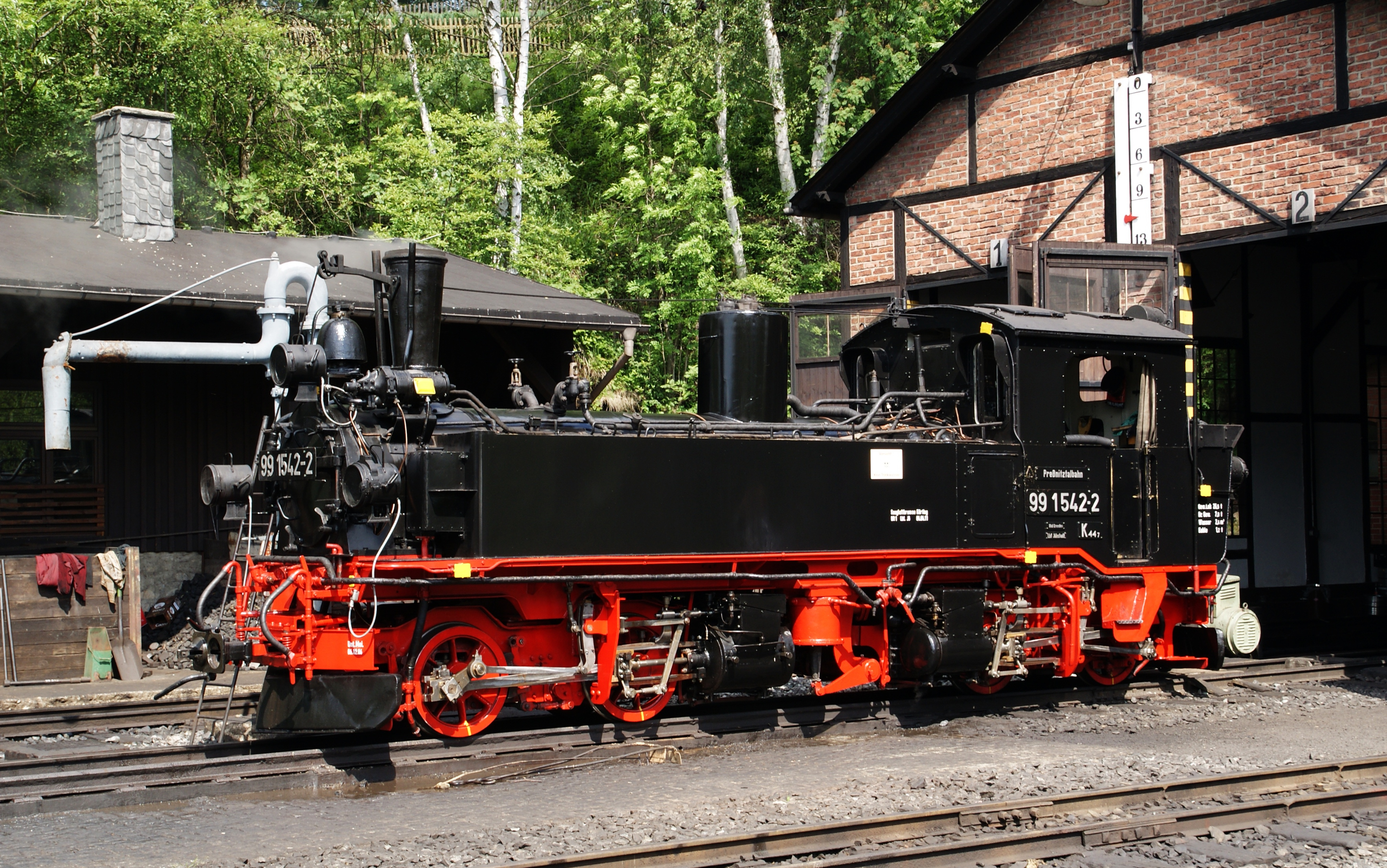 99 1542 am 11.6.2011 in Jöhstadt